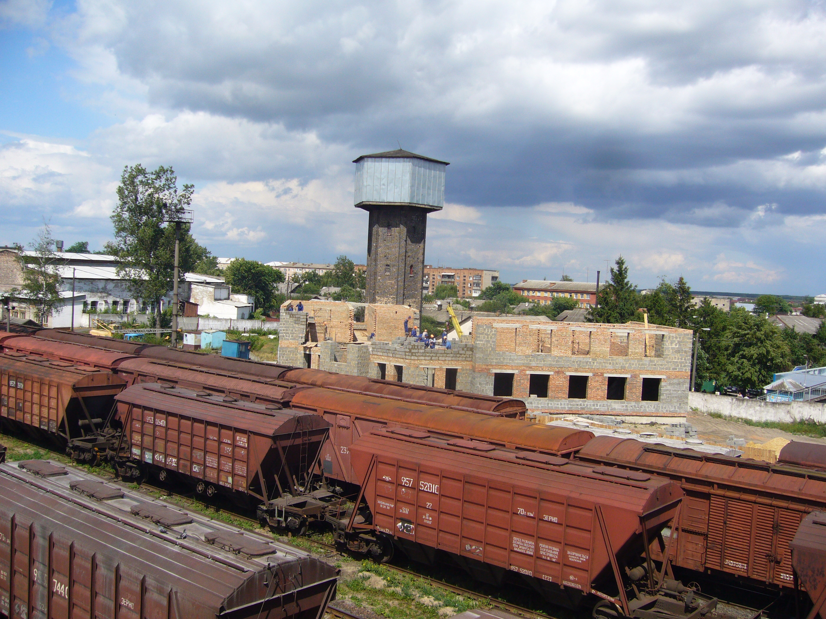 Сарни